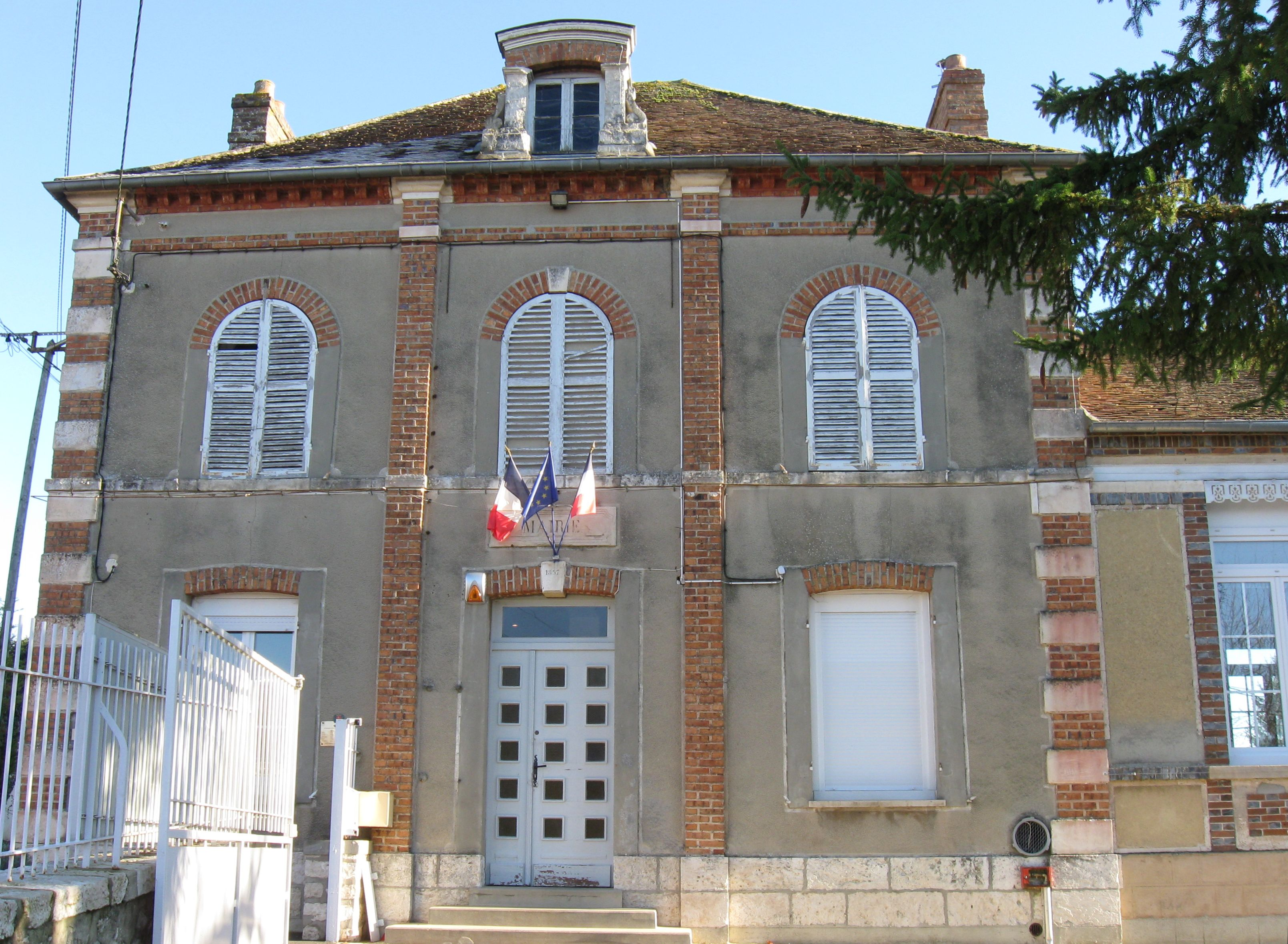 Mairie de Laval-en-Brie. (département de la Seine-et-Marne, région Île-de-France).